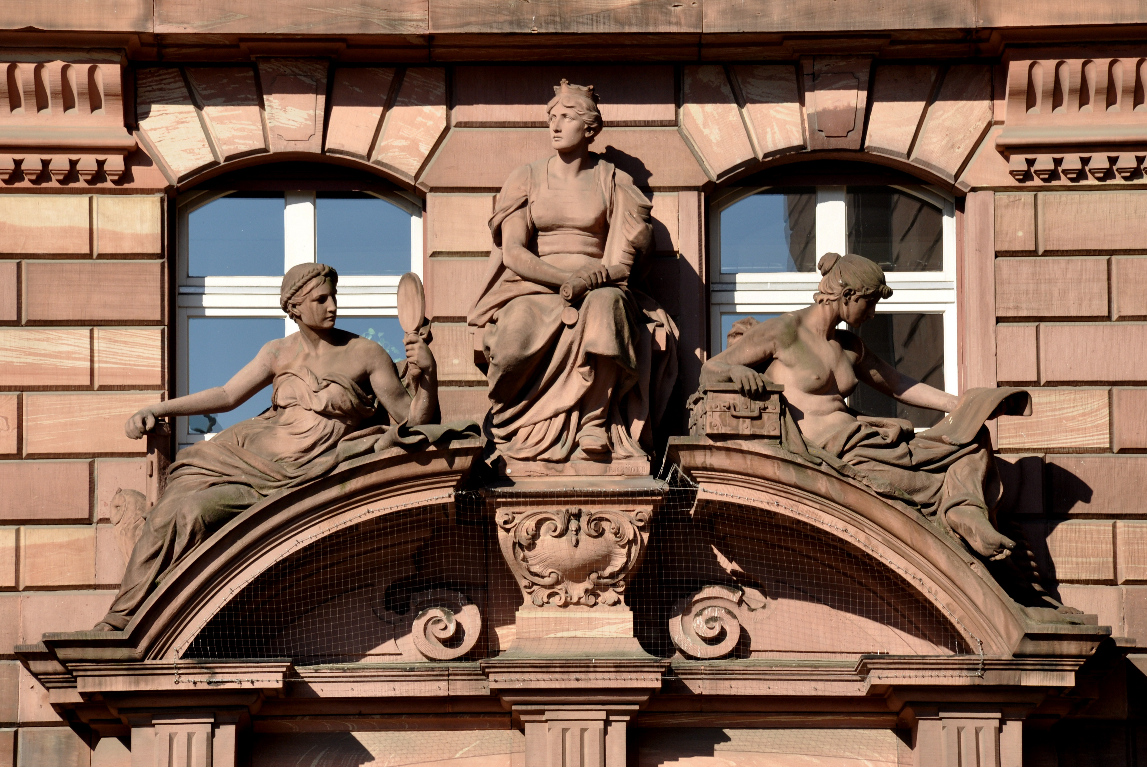 Frankfurt am Main, Neues Rathaus, nördlicher Teil, Fassade zum Paulsplatz , Fassadendetail